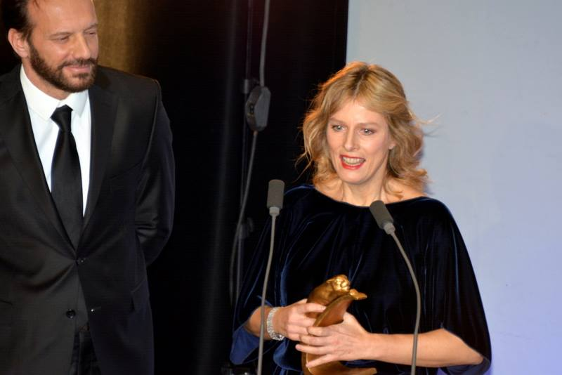 Samuel Le Bihan et Karin Viard à la cérémonie des prix Lumières